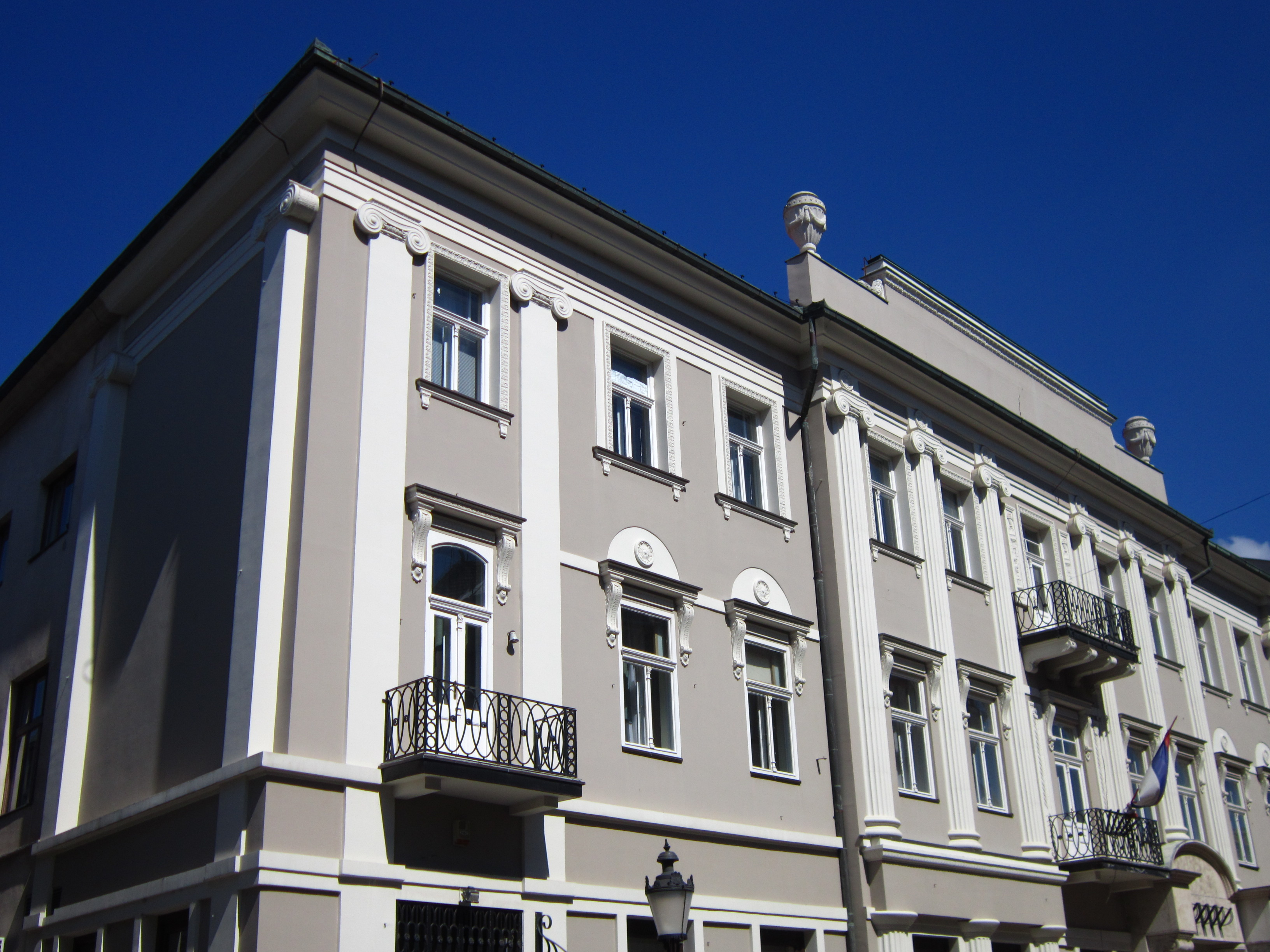 Зграда у Ул. Корзо бр. 5 , Суботица